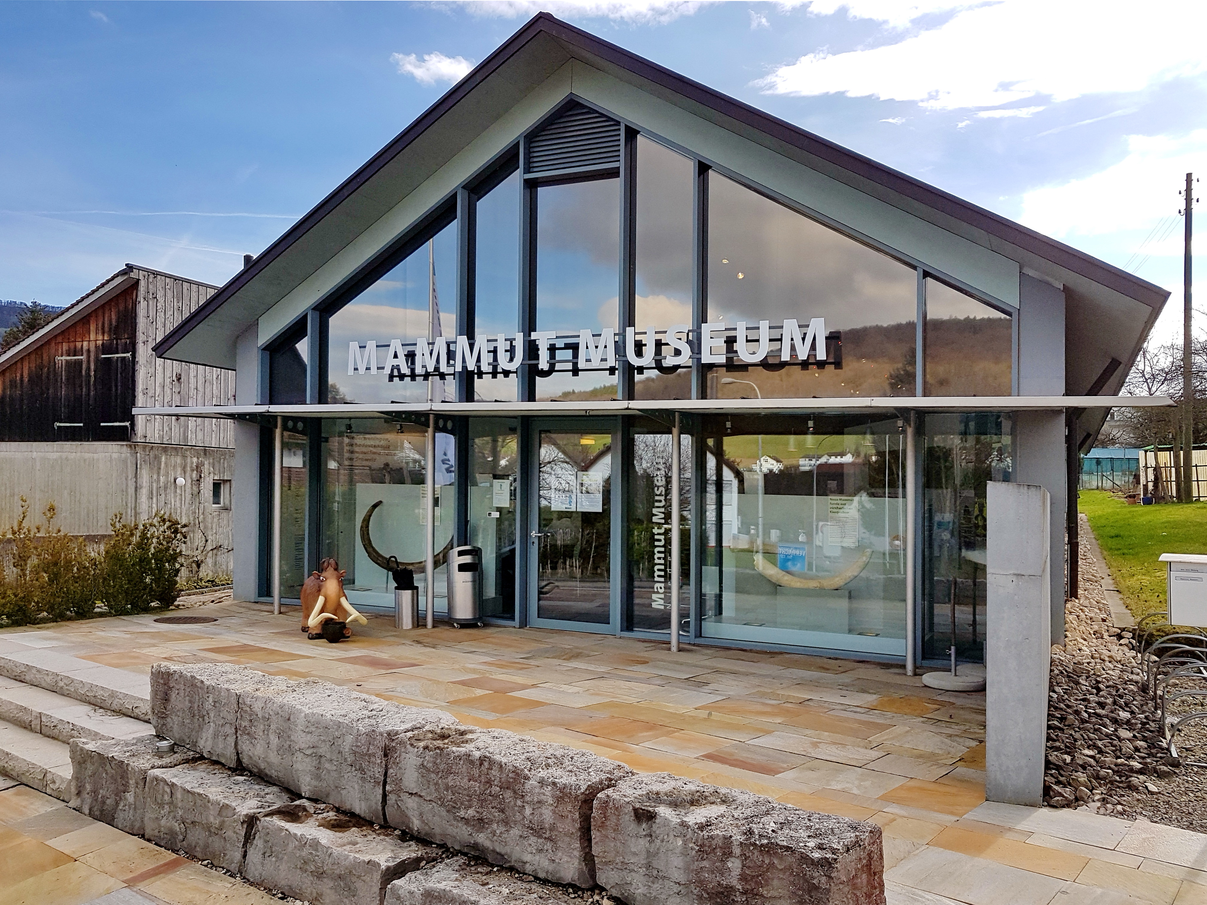 Mammutmusem in Niederweningen (Switzerland)